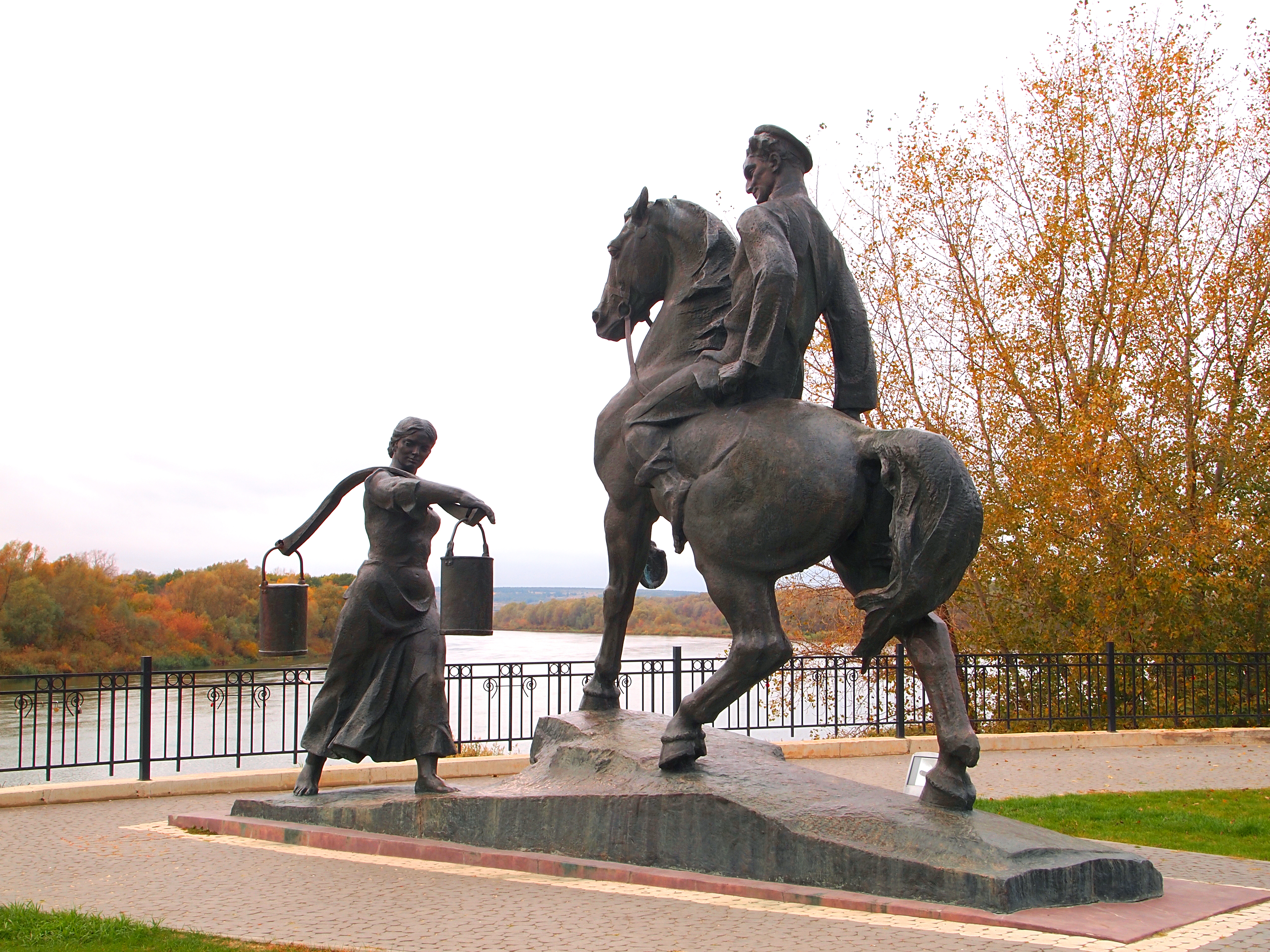 Скульптурная композиция Григорий и Аксинья: улица Набережная, 42, Вёшенская, Шолоховский район, Ростовская область